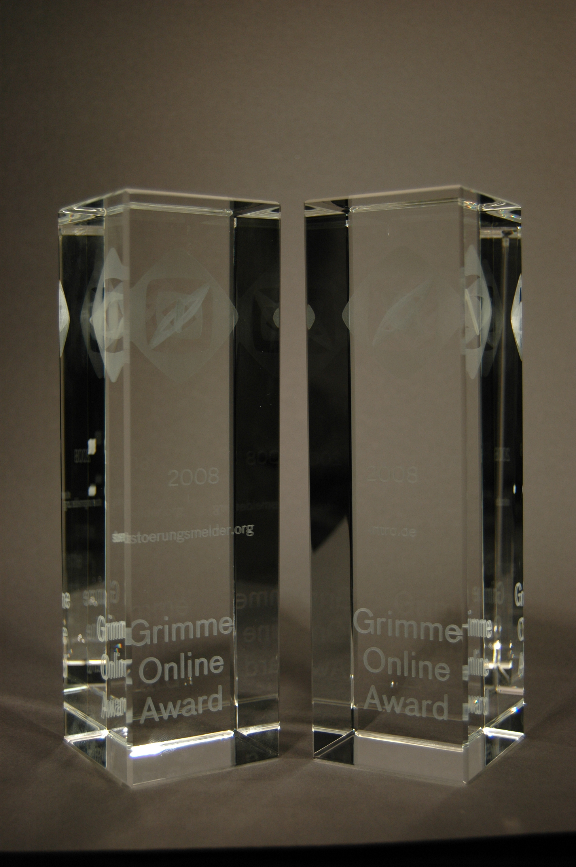 Trophäe des Grimme Online Awards im Jahr 2008